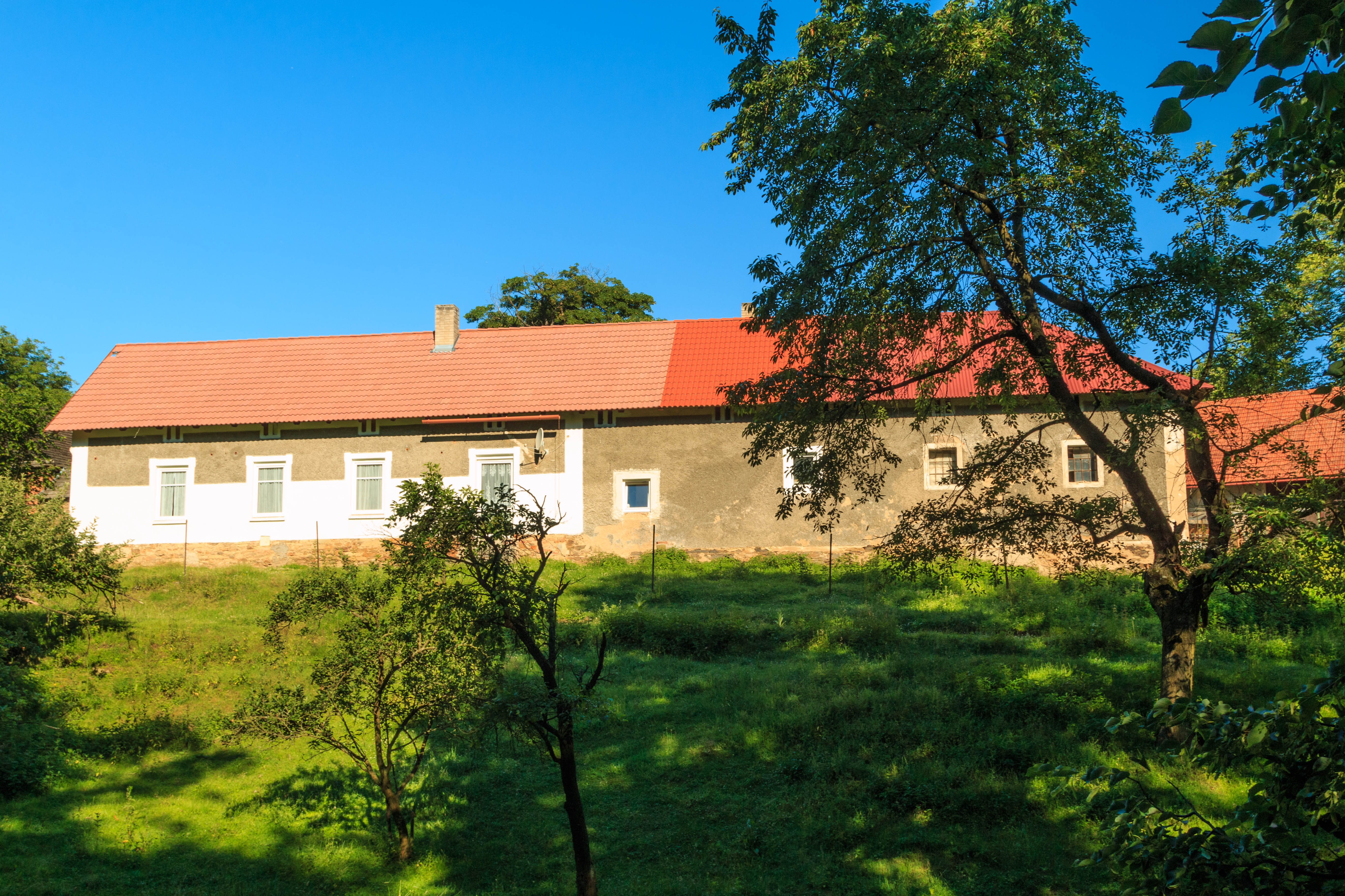 Jakubovice u Vilémova čp. 2